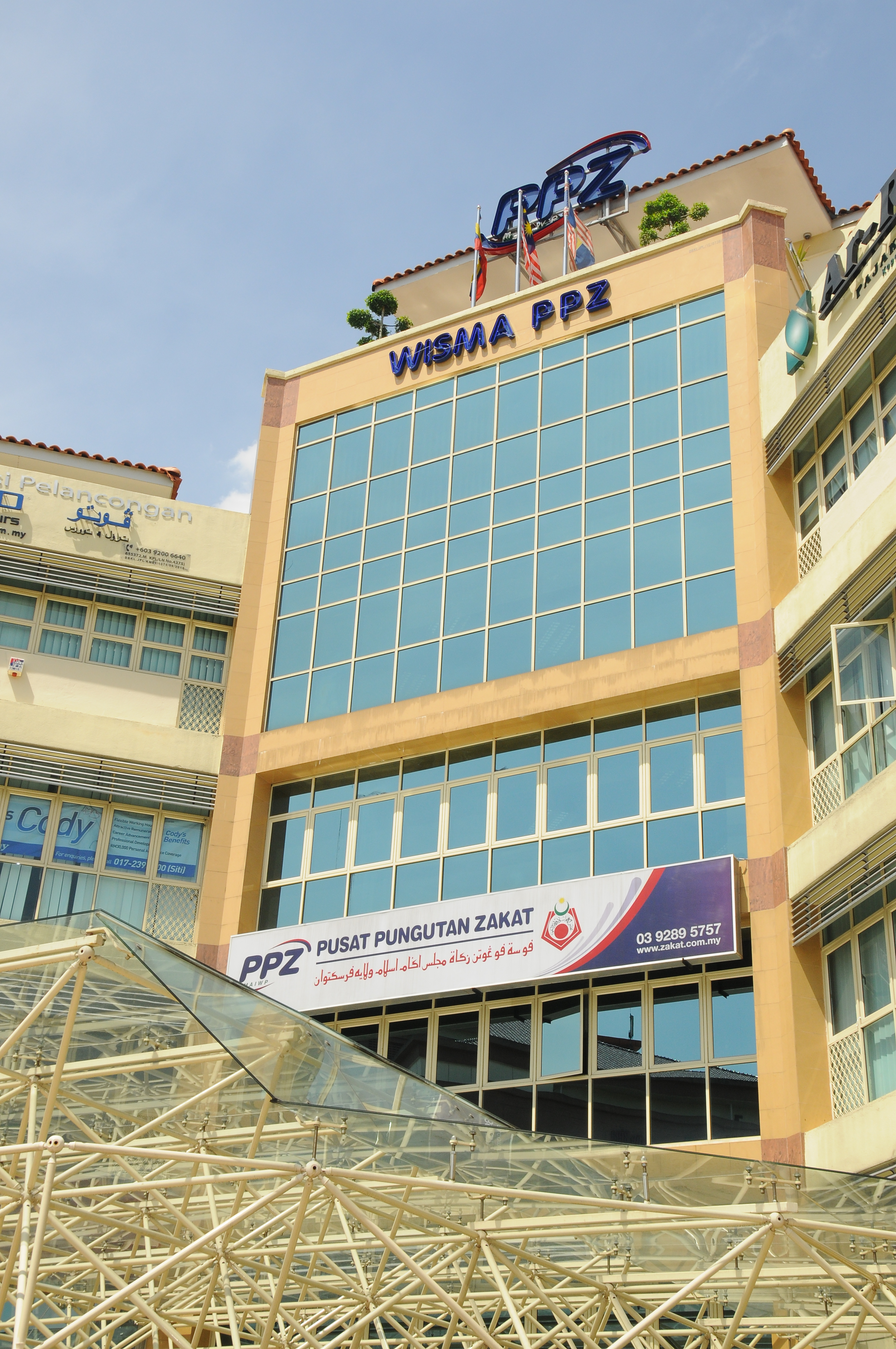 Gambar bangunan Wisma PPZ yang terletak di Wisma Shamelin Perkasa, Kuala Lumpur